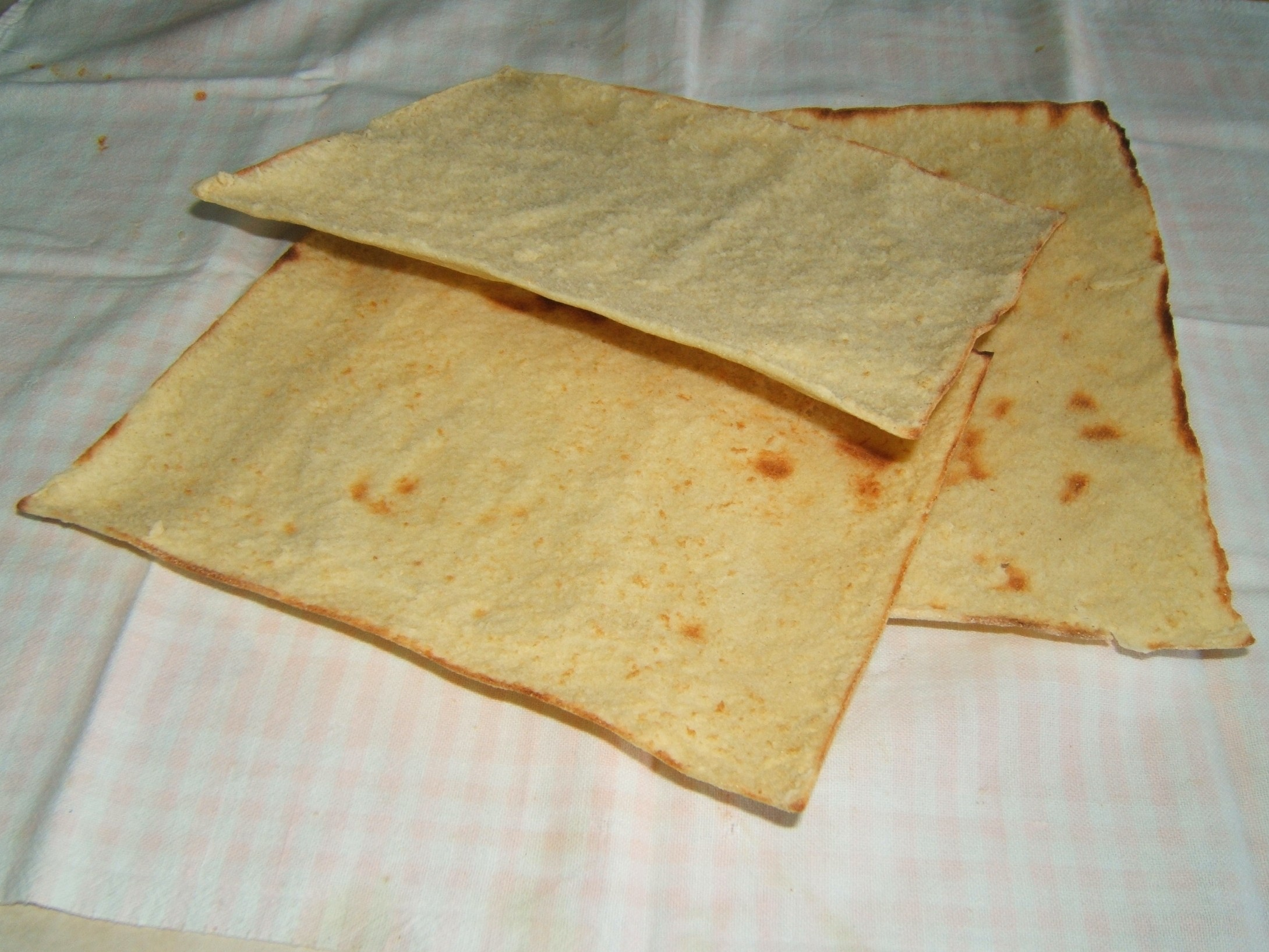 su pistoccu comprato al supermercato